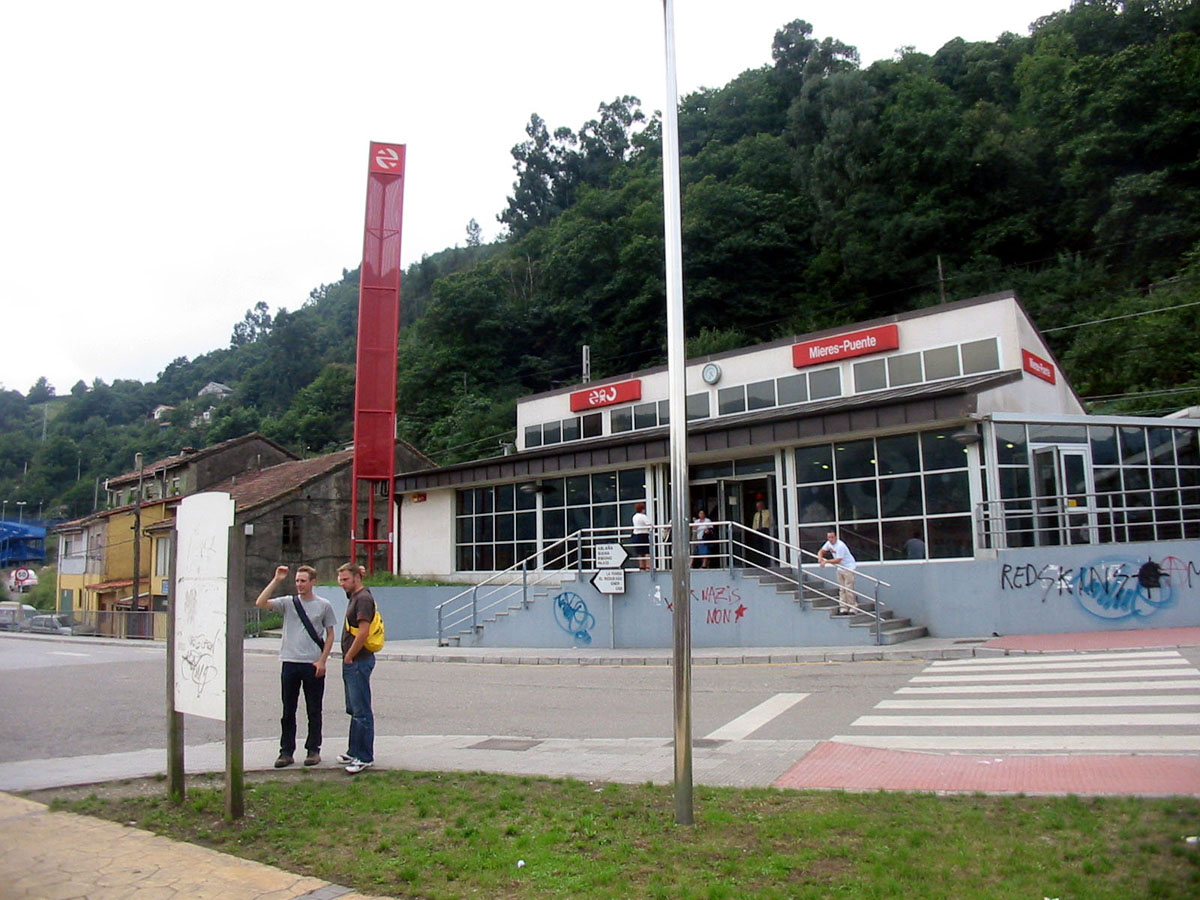 Estación de Mieres-Puente de Adif (Asturias).